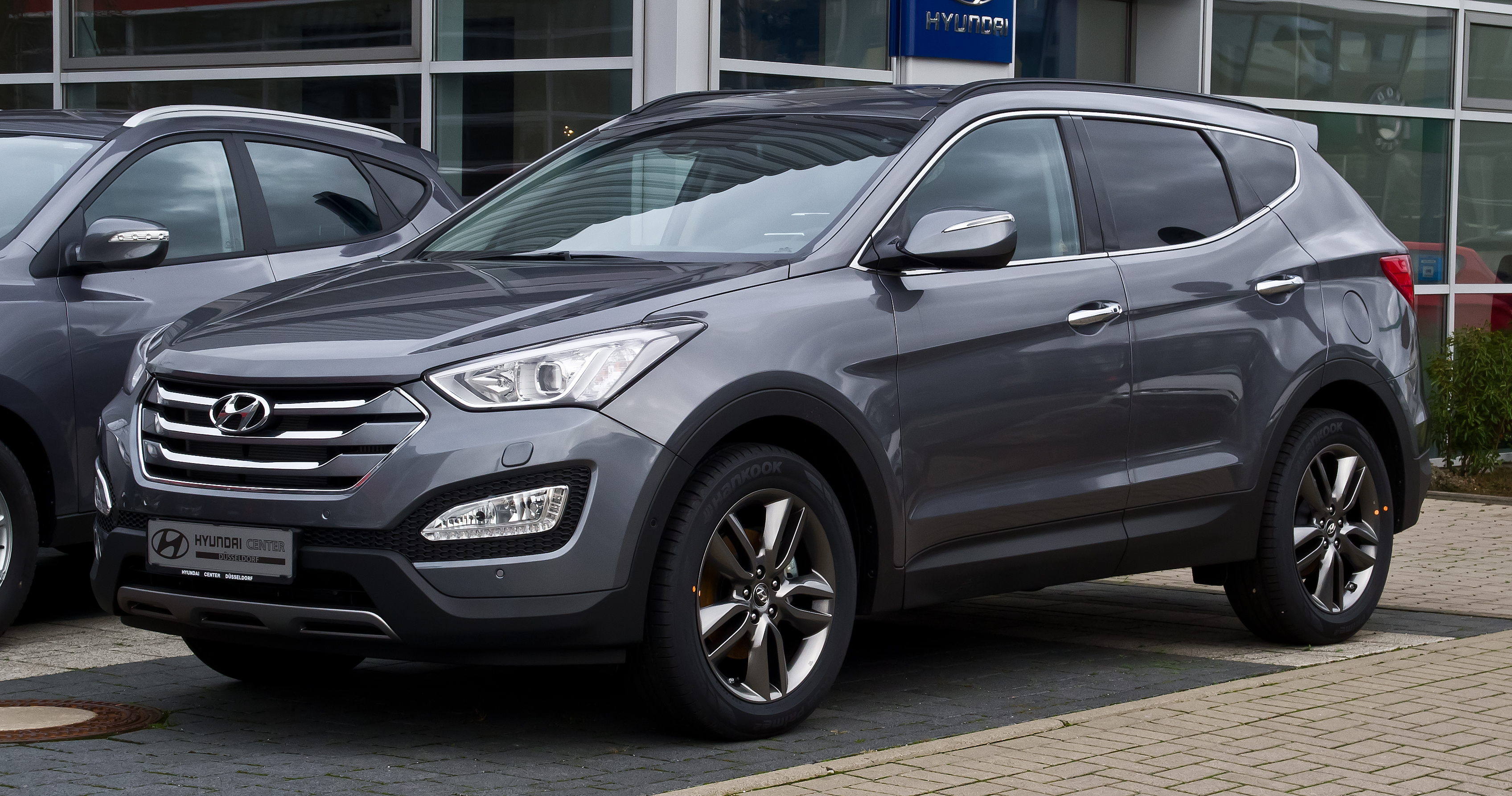 Hyundai Santa Fe 2.2 CRDi 4WD Premium (III)